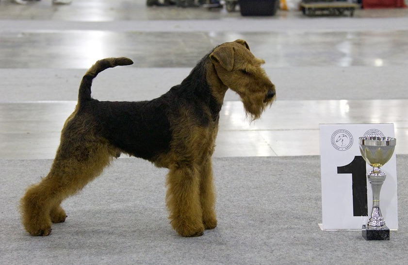 Вельштерьер Кетчер Трайв Рамштайн - юный чемпион Украины, чемпион Украины, чемпион Словении, вице-чемпион Европы-2010.